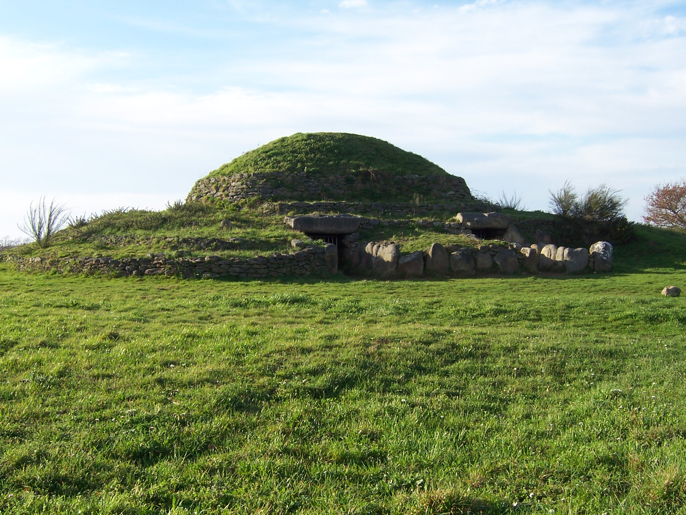 Les deux entrées du Tumulus de Dissignac, Site mégalithique de Loire-Atlantique, à Saint-Nazaire (France)